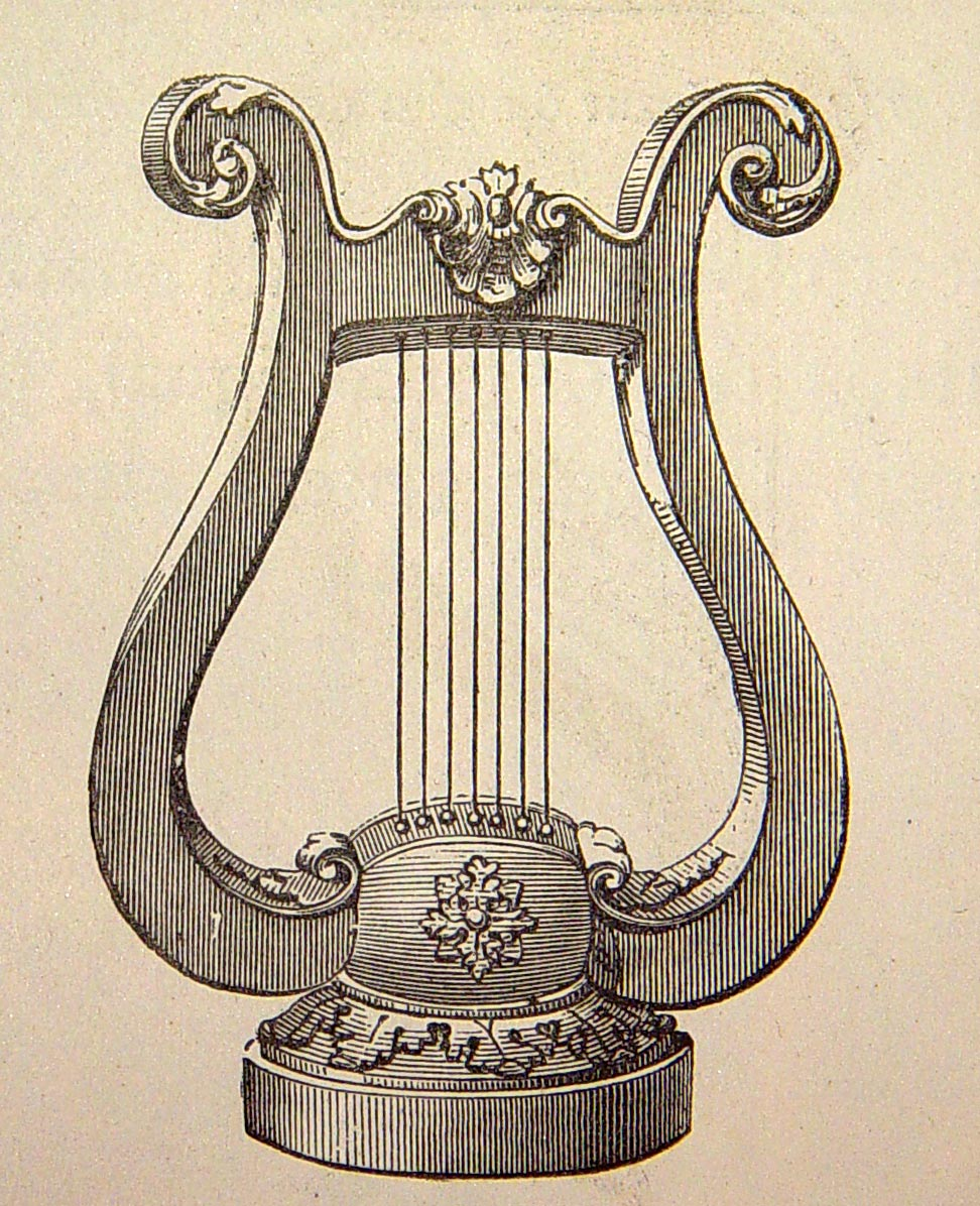 "Lira heptacordada". Ilustraciones pertenecientes al libro : El mundo físico : gravedad, gravitación, luz, calor, electricidad, magnetismo, etc. / A. Guillemin. - Barcelona Montaner y Simón, 1882